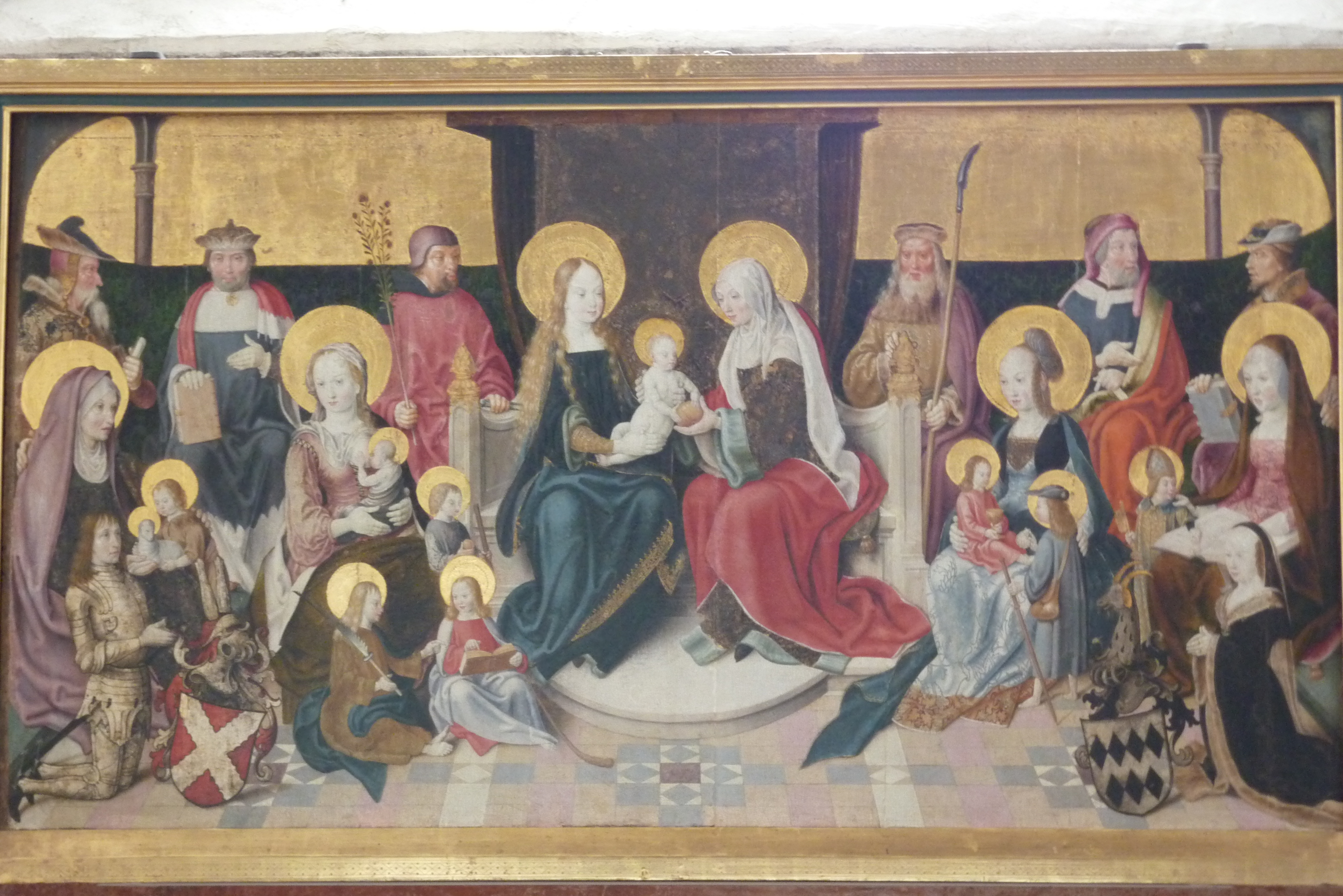 katholische Pfarrkirche St. Georg in Frauenberg, Tryptichon – Mitte